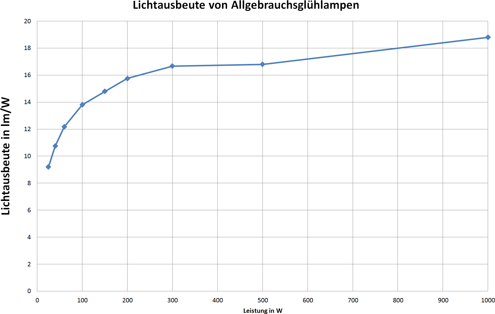 Lichtausbeute von Allgebrauchsglühlampen bei 220 Volt